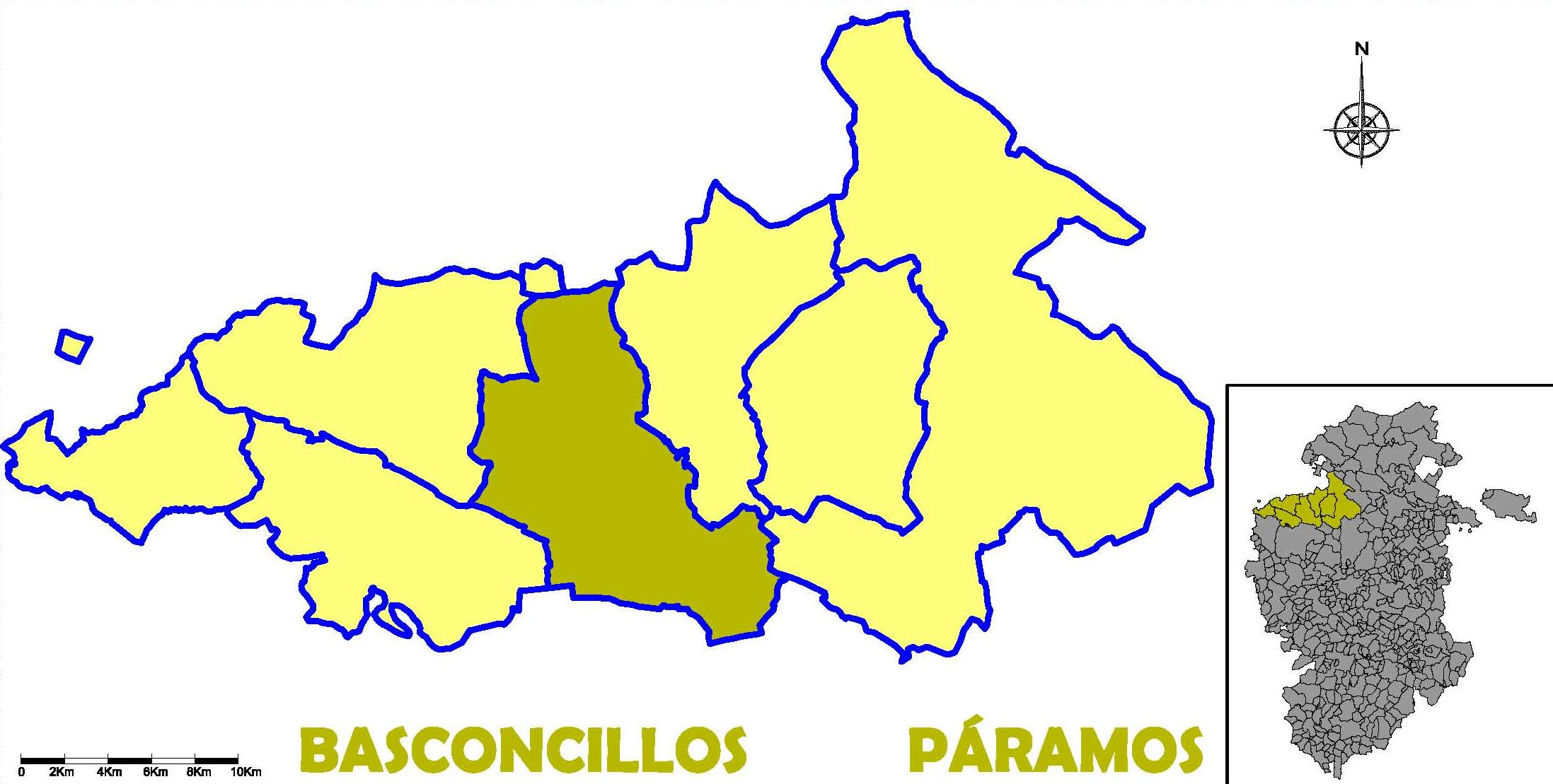 Situación del municipio de Basconcillos del Tozo en la comarca de Páramos, provincia de Burgos